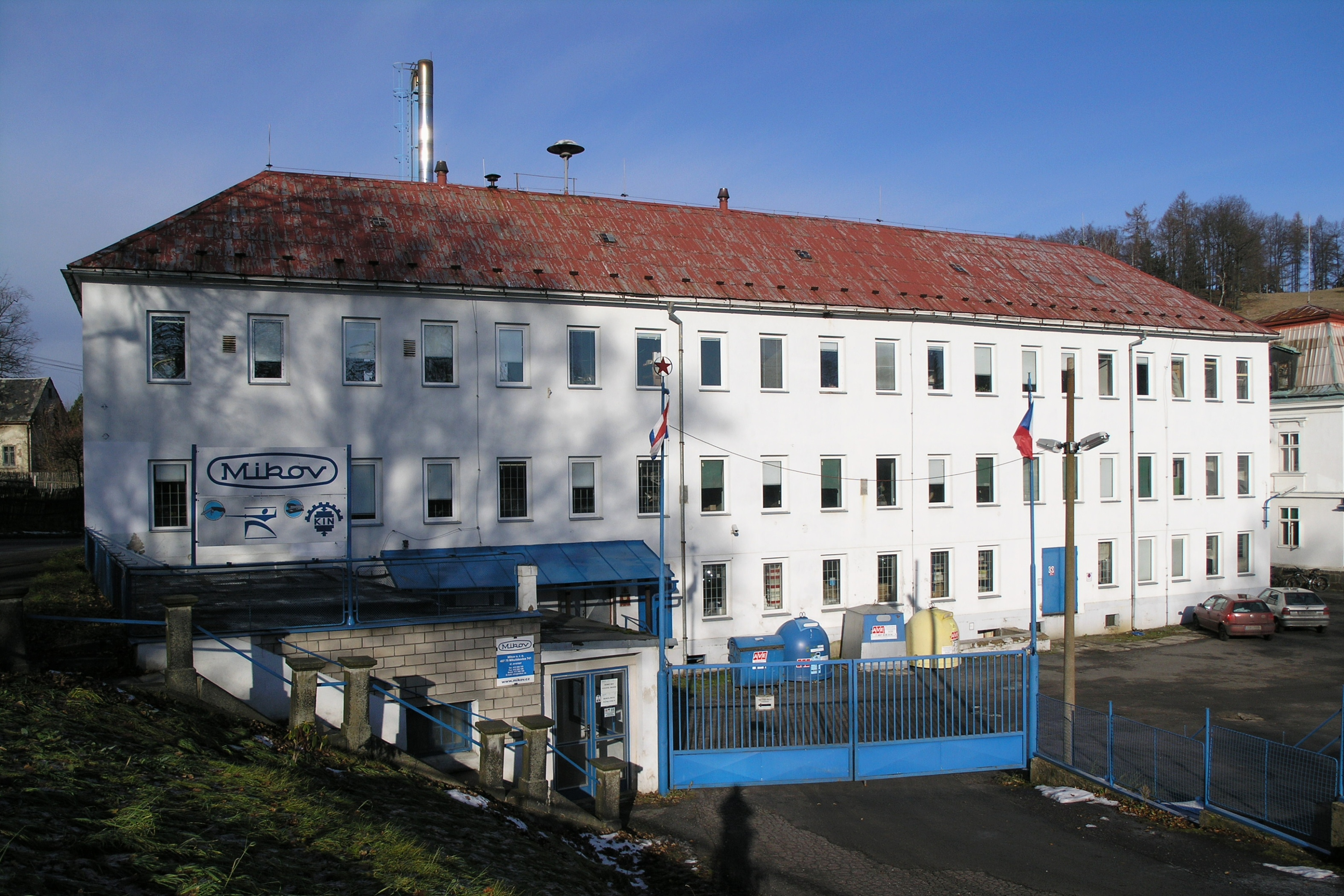 Mikulášovice - Mikov